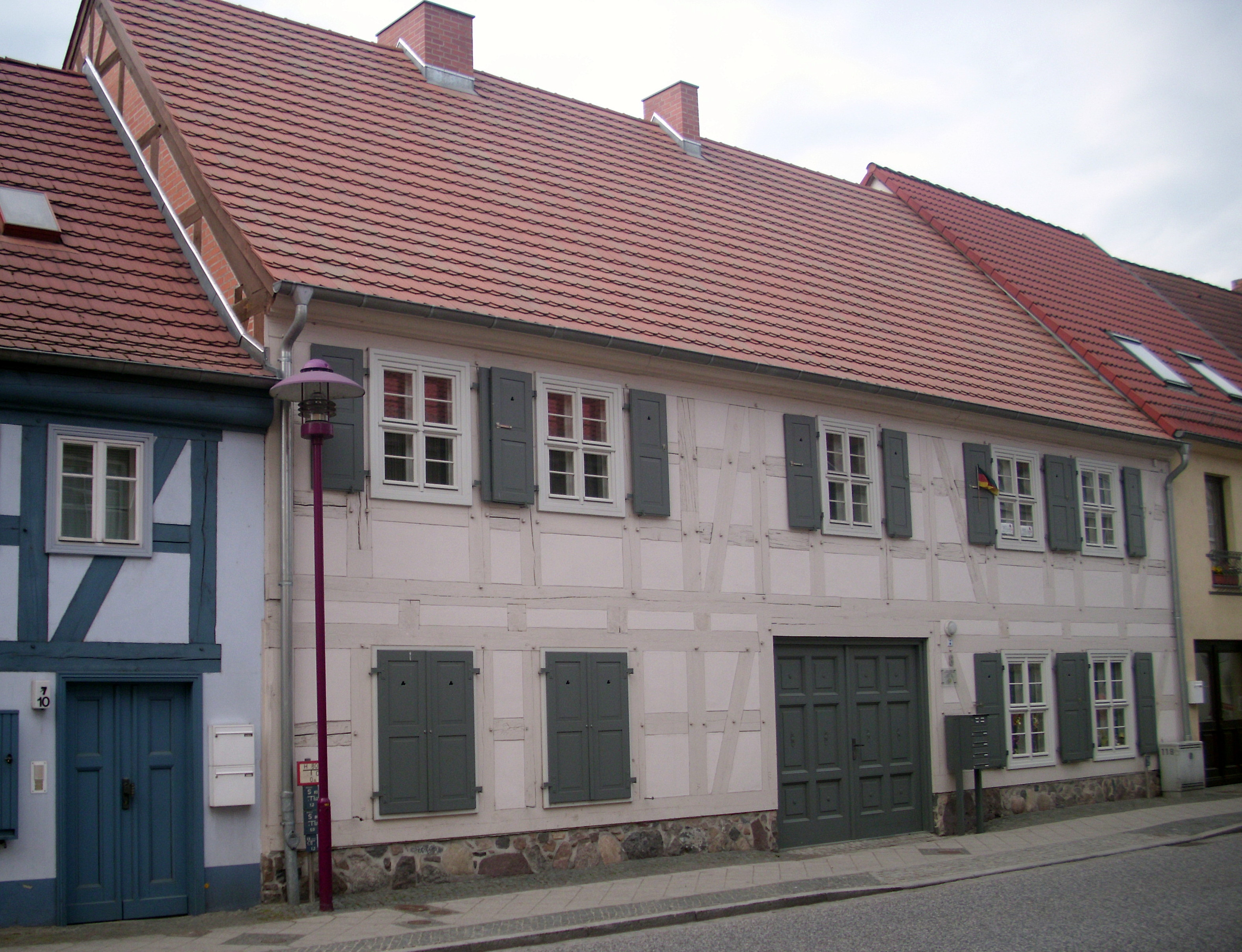 Ackerbürgerhaus Müllrose